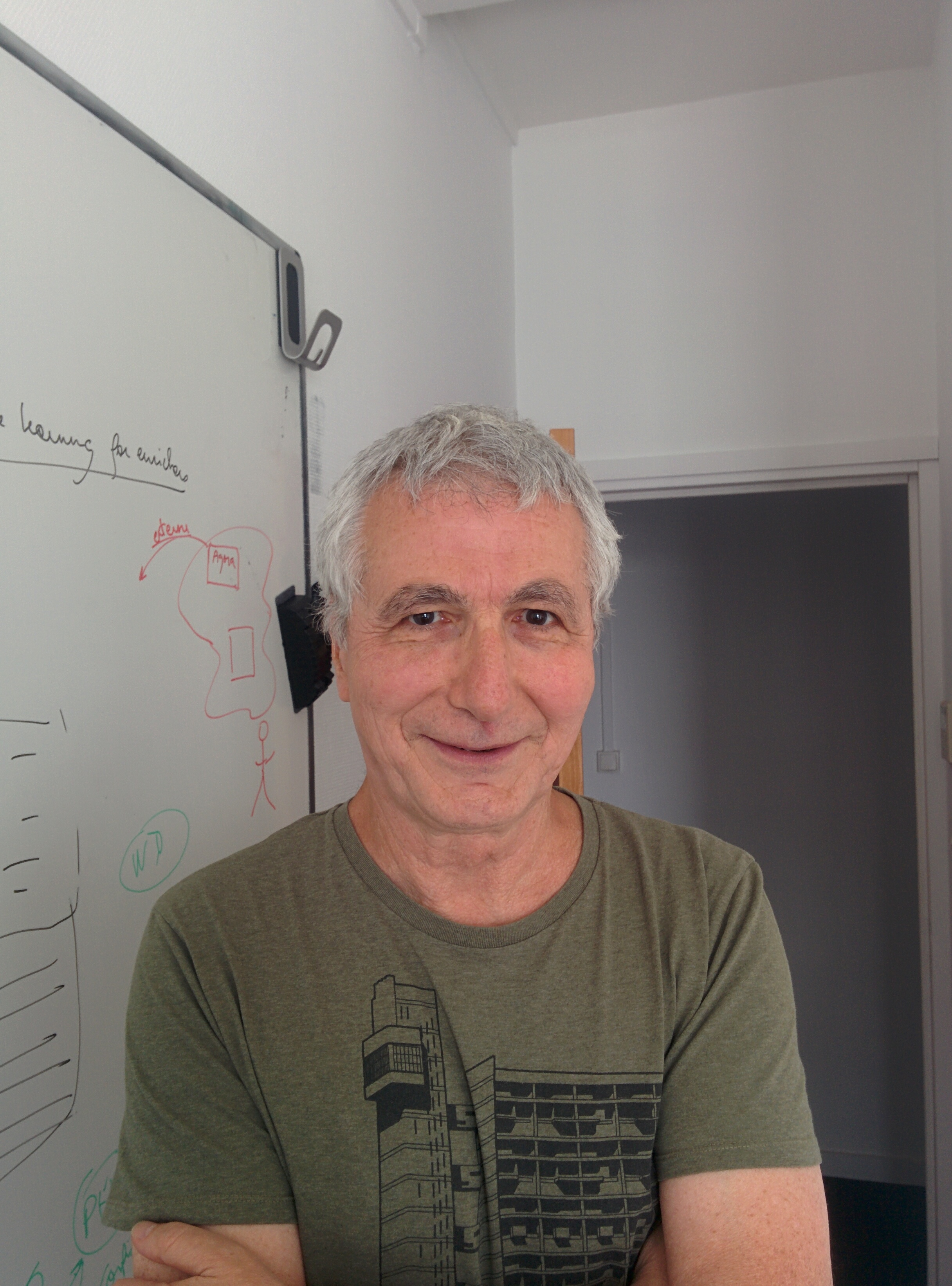 Serge Abiteboul